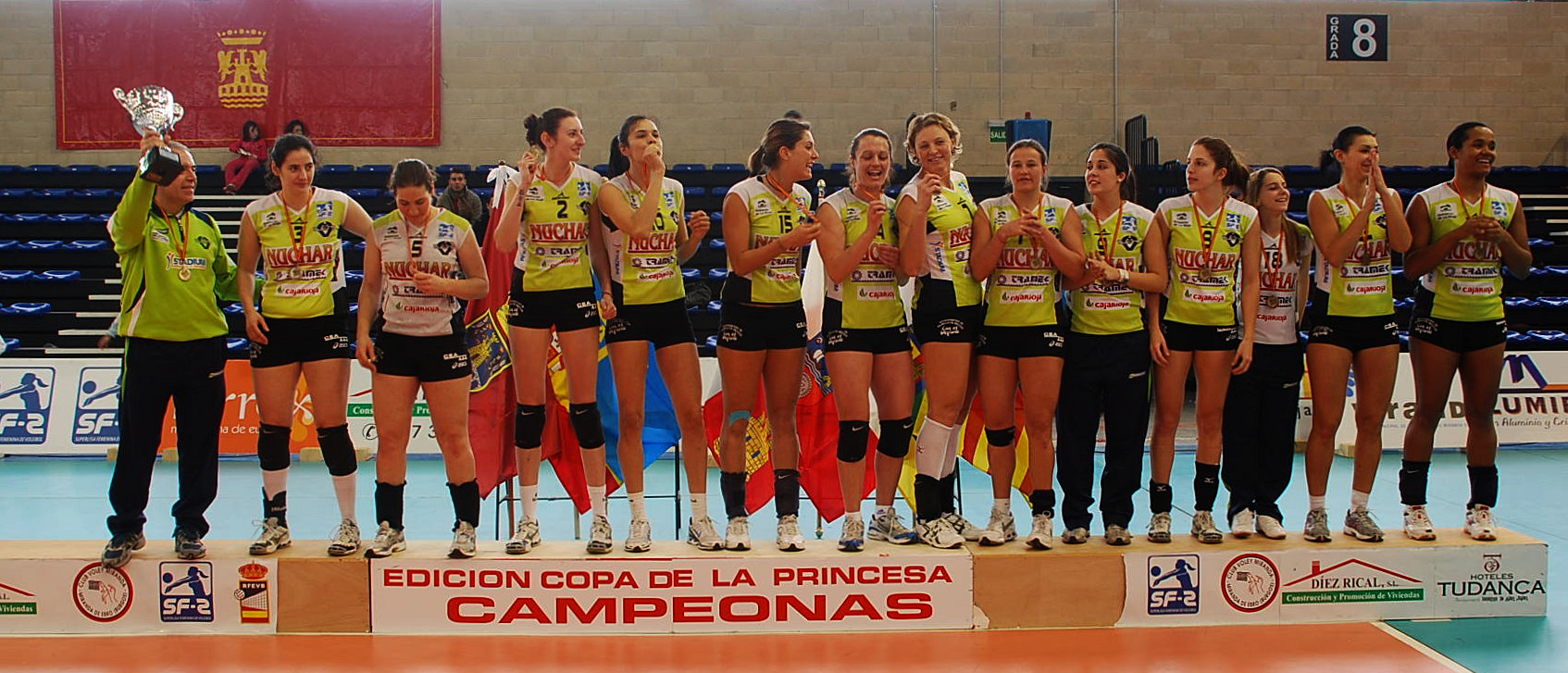 Entrega de la Copa de la Princesa 2010 al Club Voleibol Murillo